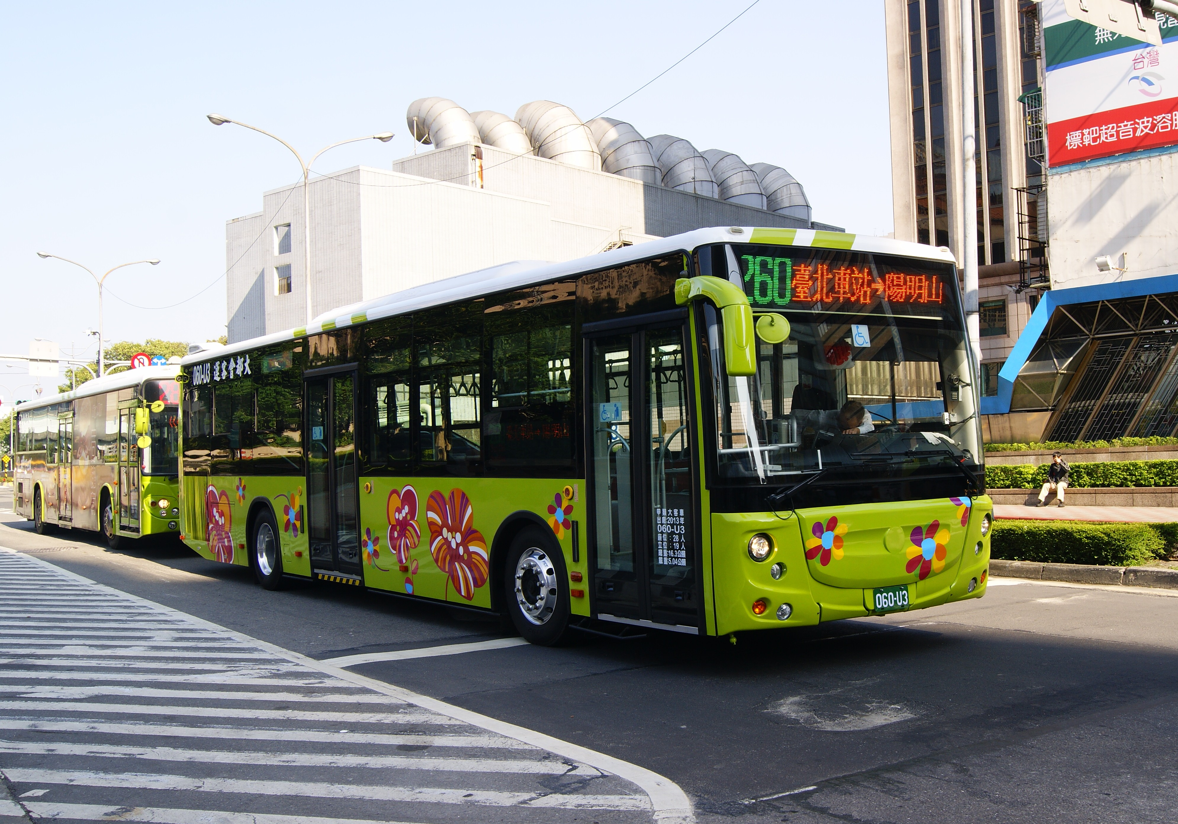 大都會客運福田柴油低地板